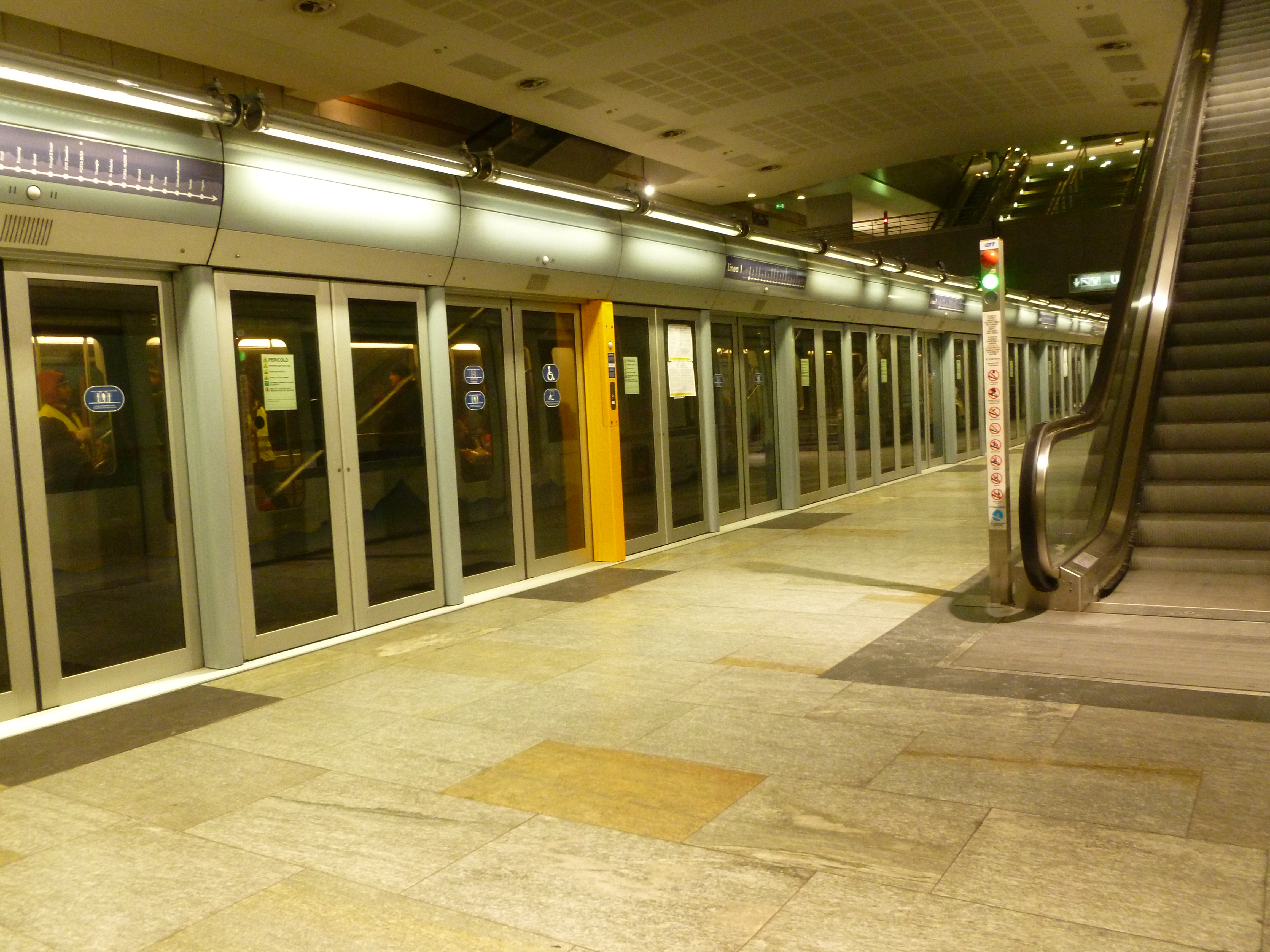 Stazione Marche della metropolitana di Torino